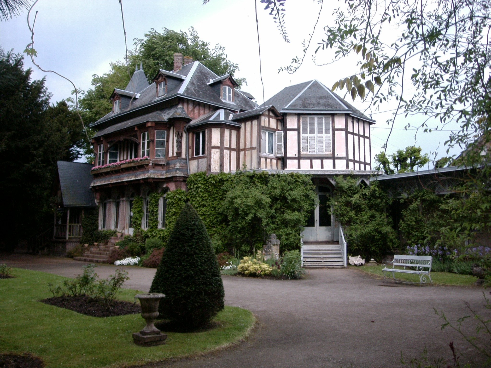 Das Haus des Schriftstellers Maurice Leblanc in Etretat (Detail); heute Museum Datum: 02.05.2011 Urheber: M. Pfeiffer alias Gordito1869 Quelle: privates Fotoarchiv des Urhebers